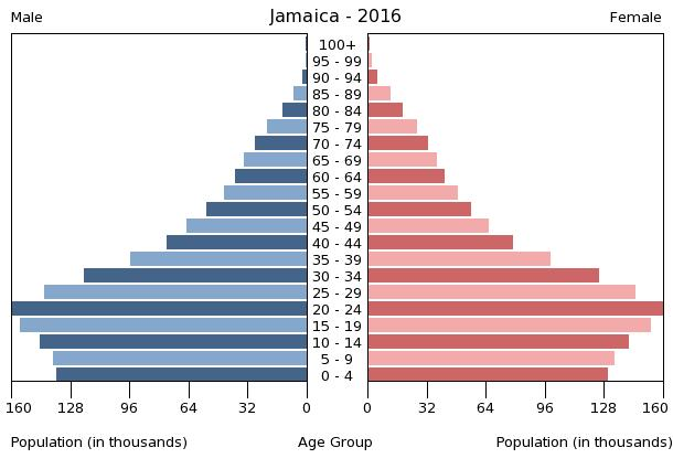 A population pyramid illustrates the age and sex structure of a country's population and may provide insights about political and social stability, as well as economic development. The population is distributed along the horizontal axis, with males shown on the left and females on the right. The male and female populations are broken down into 5-year age groups represented as horizontal bars along the vertical axis, with the youngest age groups at the bottom and the oldest at the top. The shape of the population pyramid gradually evolves over time based on fertility, mortality, and international migration trends.